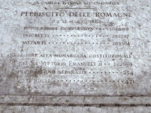 L'11 e 12 marzo in Emilia-Romagna si vota per l'annessione Regno sabaudo. Per la prima volta (e unica nell'Ottocento) possono andare alle urne tutti i cittadini maschi (suffragio universale maschile). A Bologna circa 16.000 persone vanno festose alle urne, portando coccarde tricolori appuntate sul cappello. Gli studenti e gli artigiani sfilano in gruppo dietro le proprie insegne, al suono delle campane e delle bande cittadine. Il risultato del Plebiscito è, in ambito regionale, di 426.006 voti a favore, 756 contro e 750 voti nulli. Nella provincia di Bologna, su 76.500 votanti, 76.276 sono favorevoli all'annessione e solo 63 votano per il Regno separato.